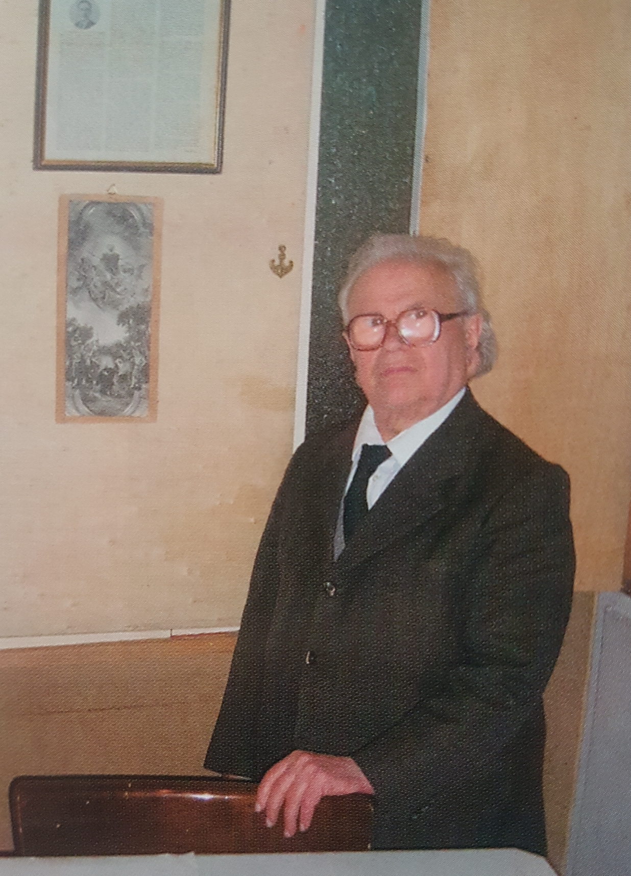 Ritratto fotografico del pittore Carmine Adamo.